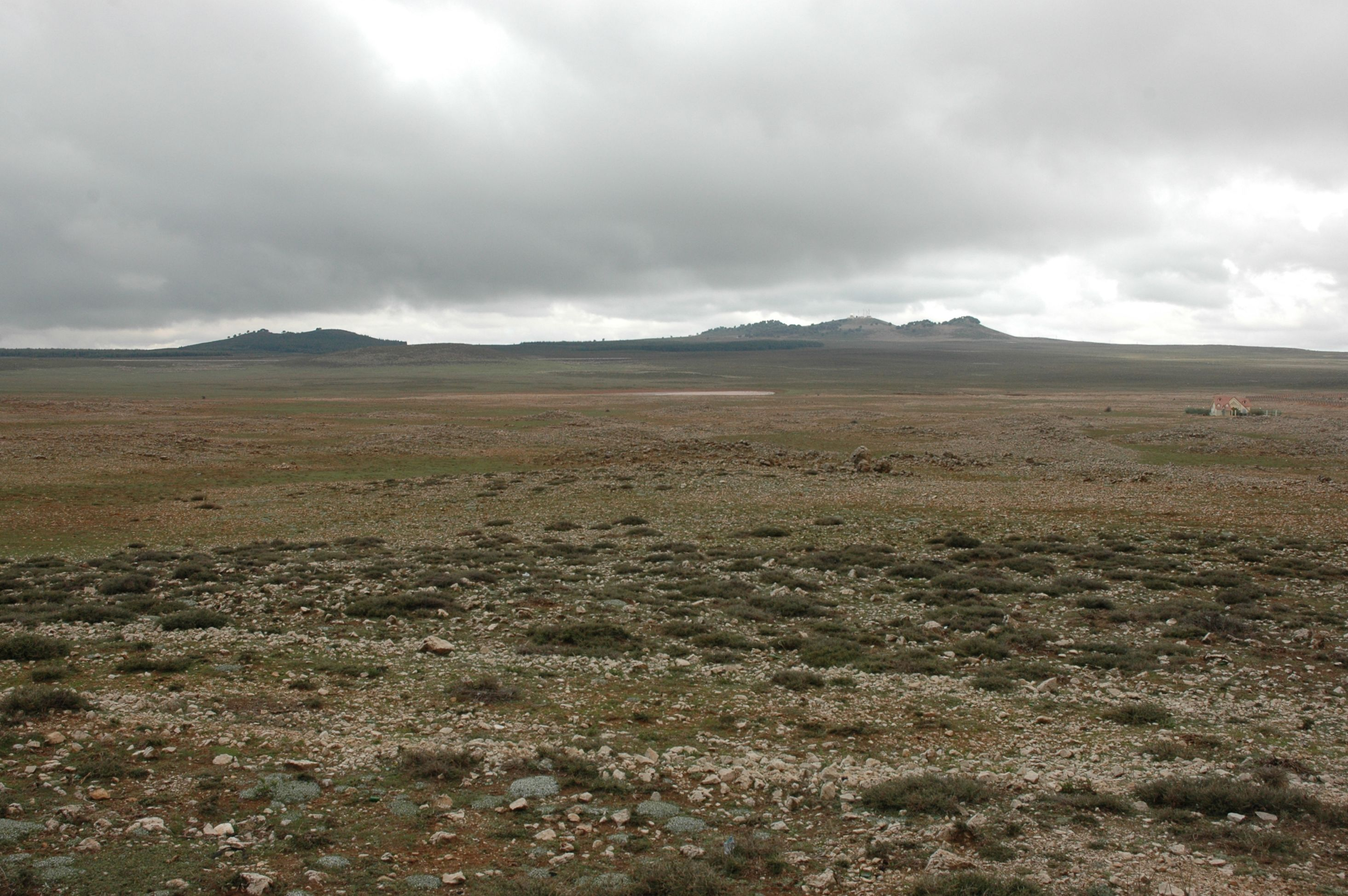 Altiplà d'Ifrane